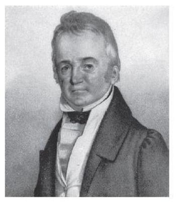 Porträt von Johann Gottlieb Korn (1765-1837)